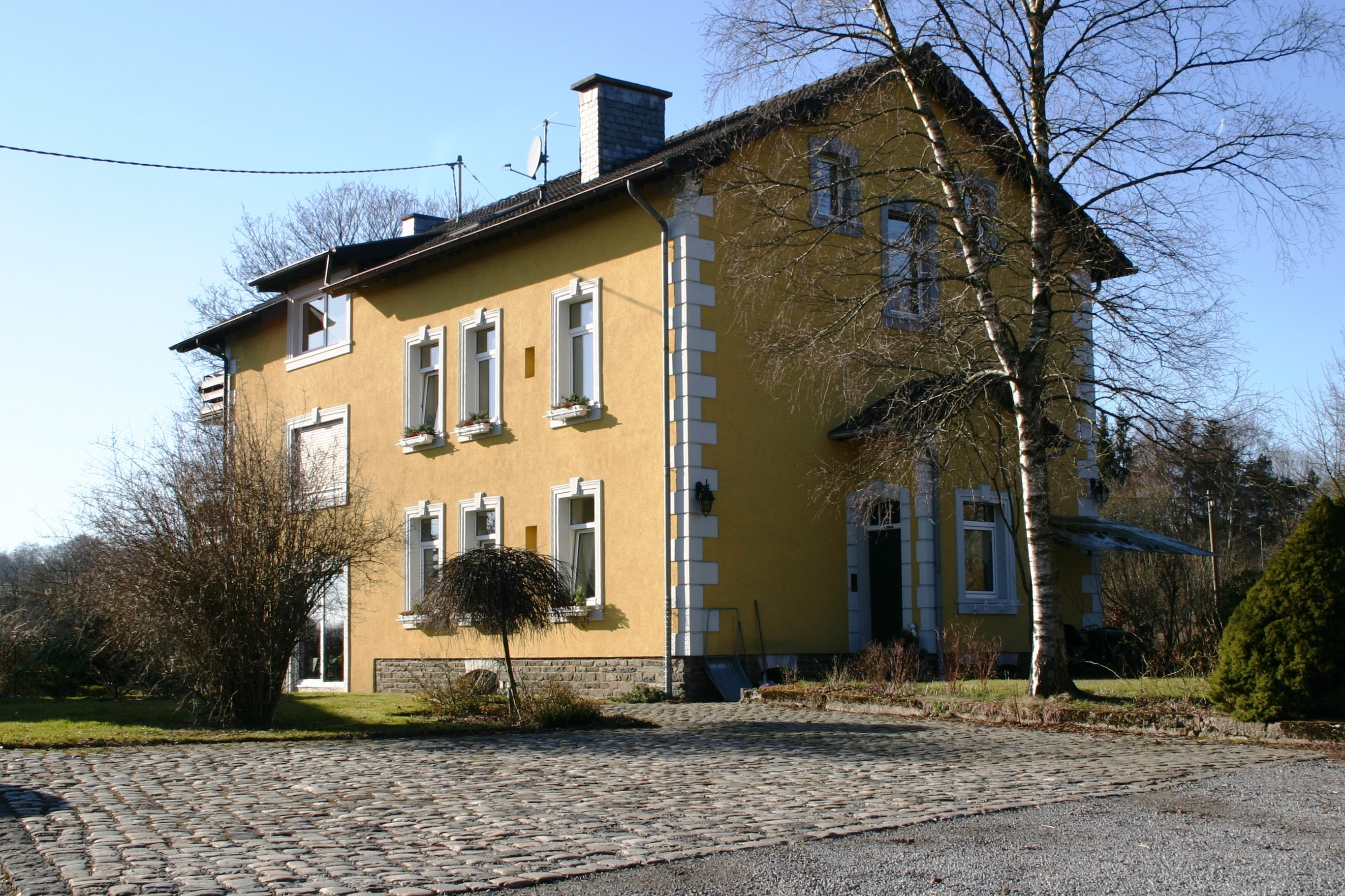 Déi restauréiert Gare vu Monschau.